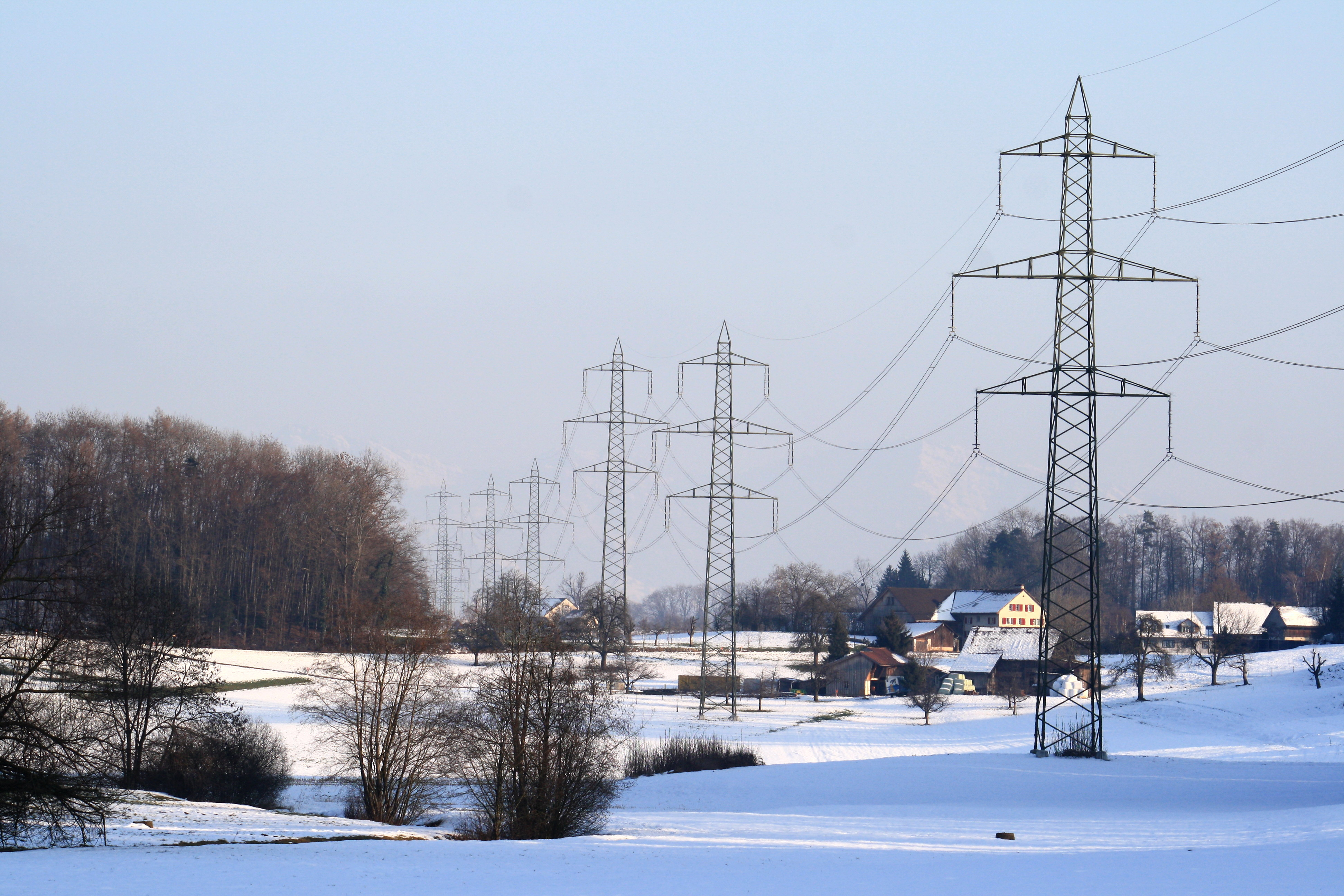 Itzikon (Grüningen) in Switzerland